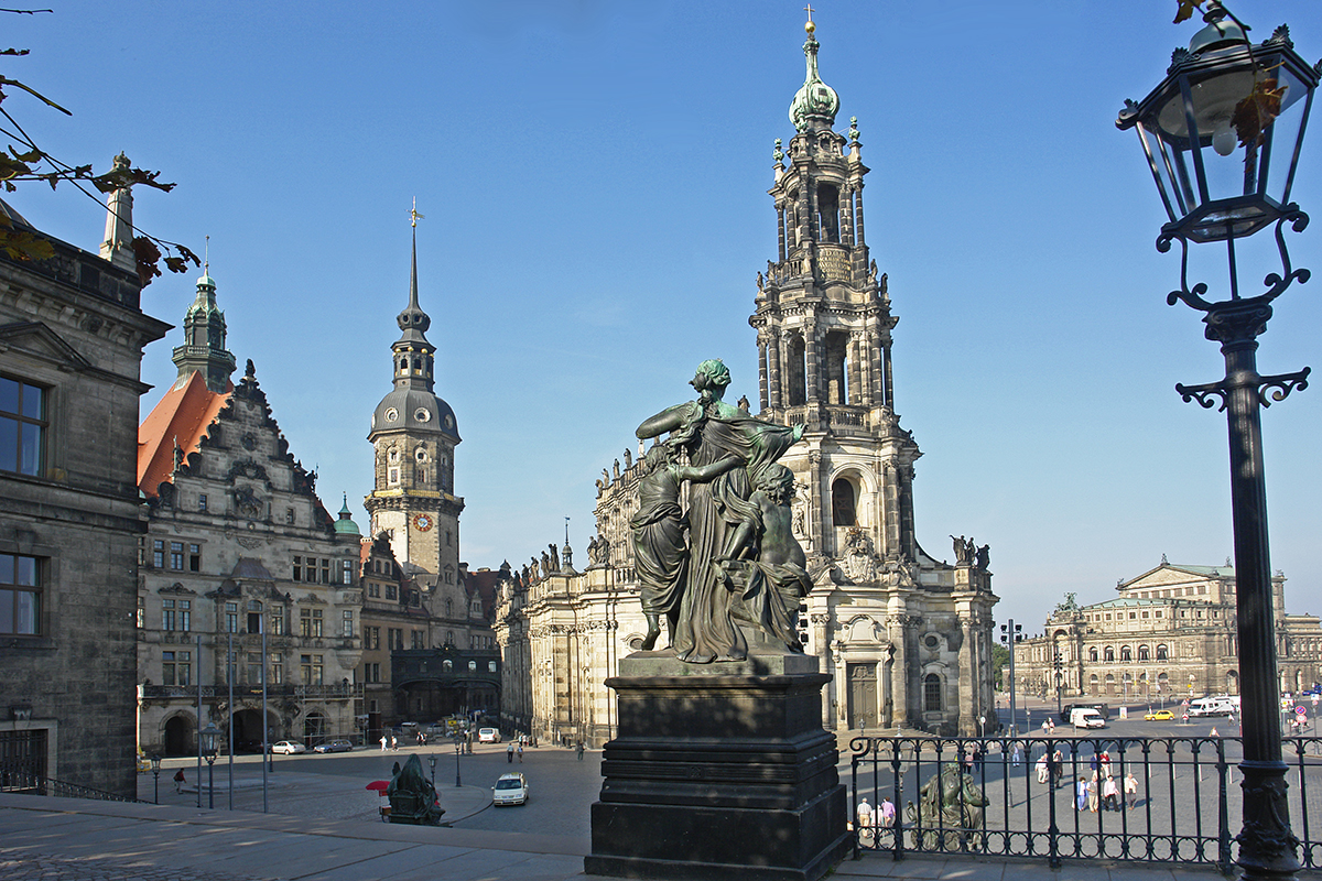 Blick von der Brühlschen Terrasse auf den Schlossplatz mit „Hofkirche“ (Dresdner Dom)